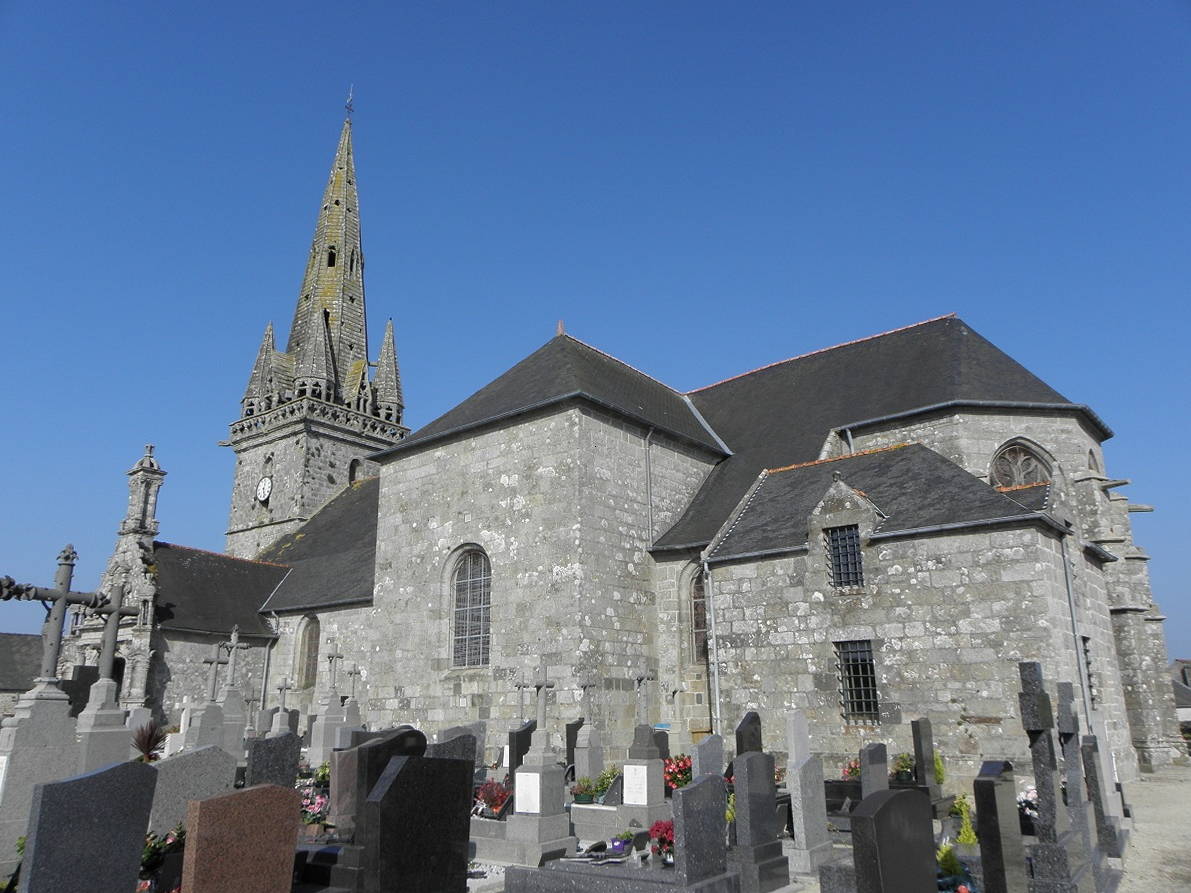 Chevet, flanc sud et tour-clocher de l'église Saint-Hervé de Lanhouarneau (29). .